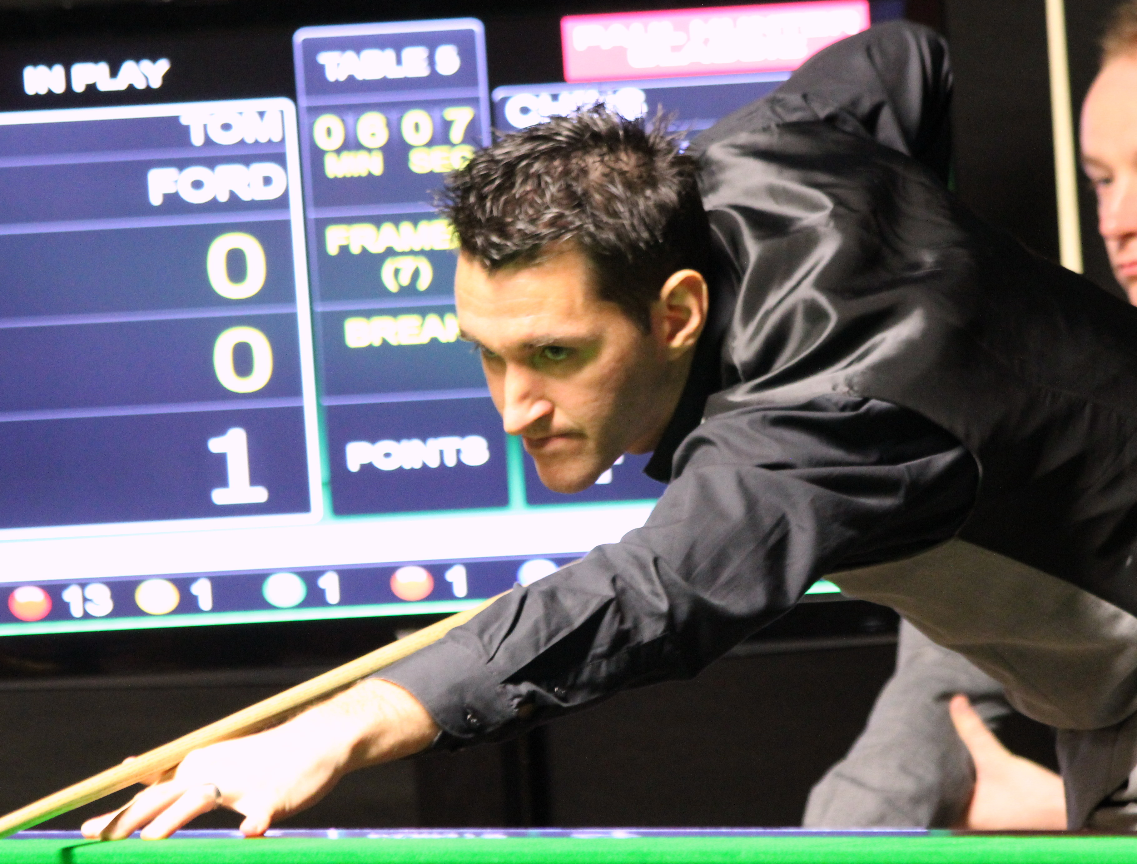 Tom Ford beim Paul Hunter Classic 2016